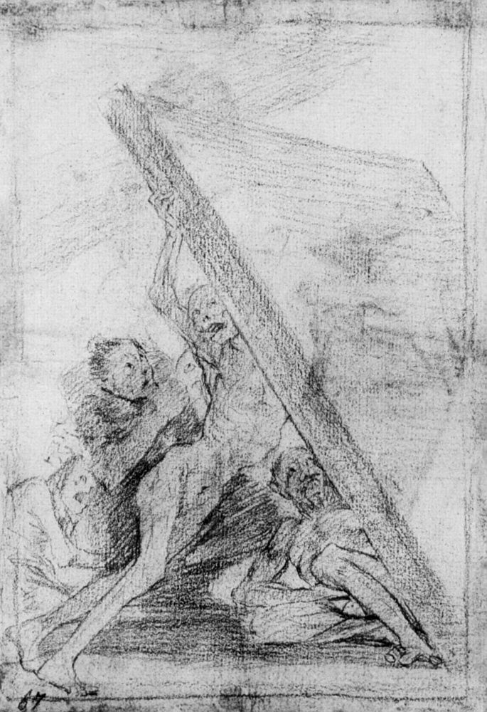 Dibujo preparatorio del capricho nª 59.